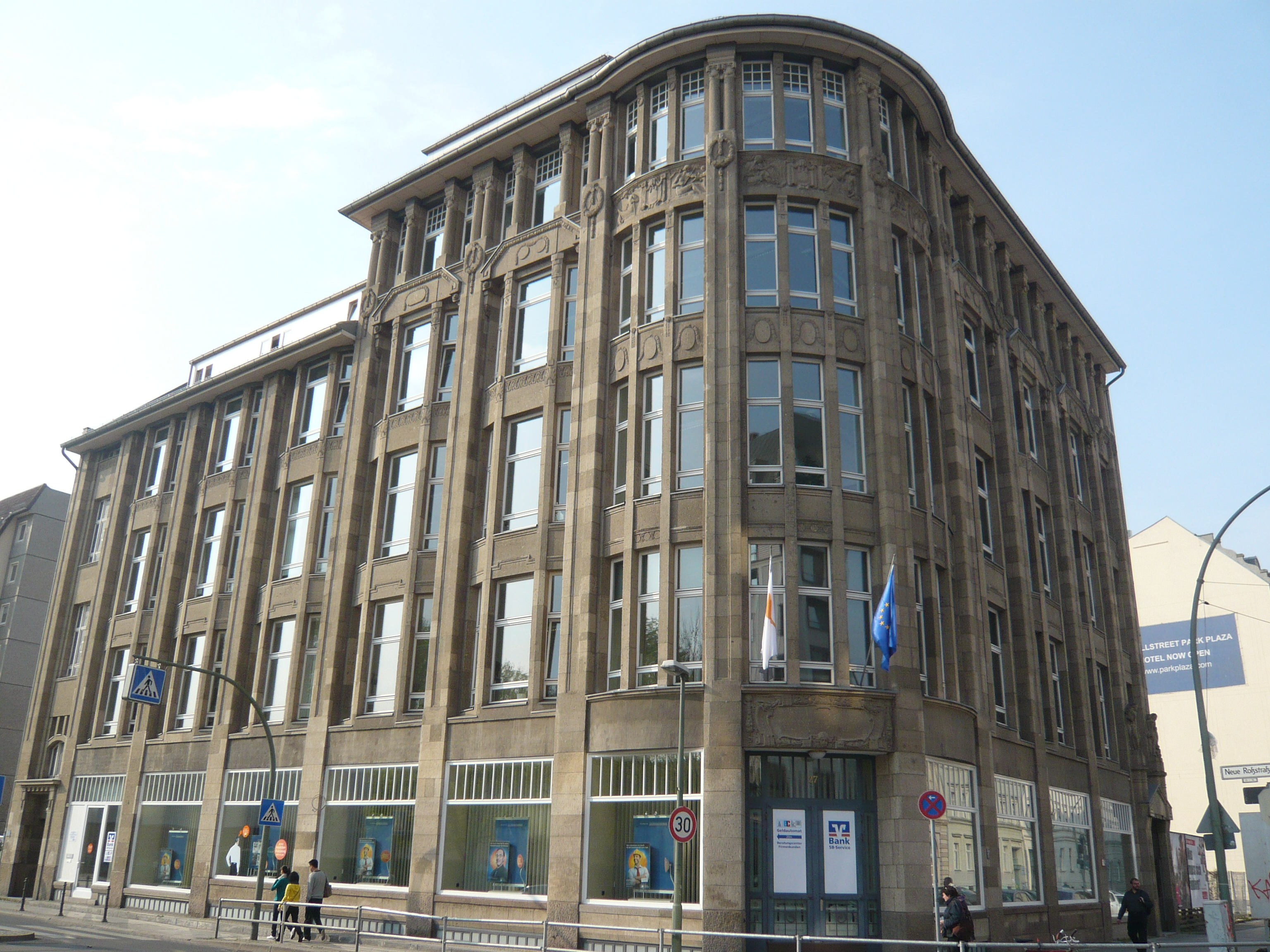 Berlin-Mitte; Wallstr. 27 Ecke Neu Roßstr.